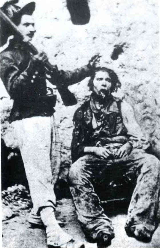 "Il Bandito Nicola Napolitano"